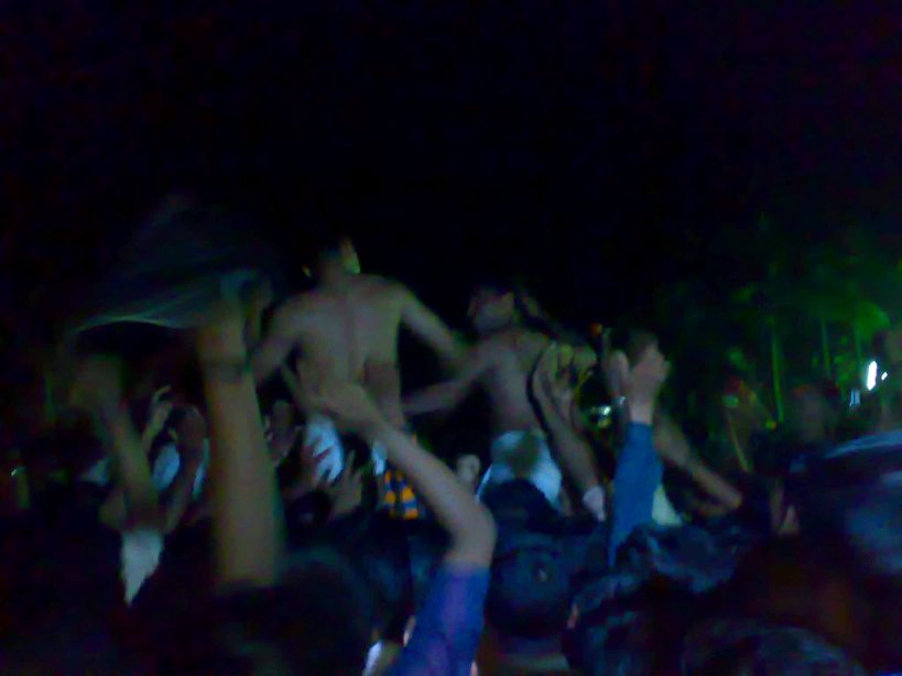 Mavilakkavu adi 2